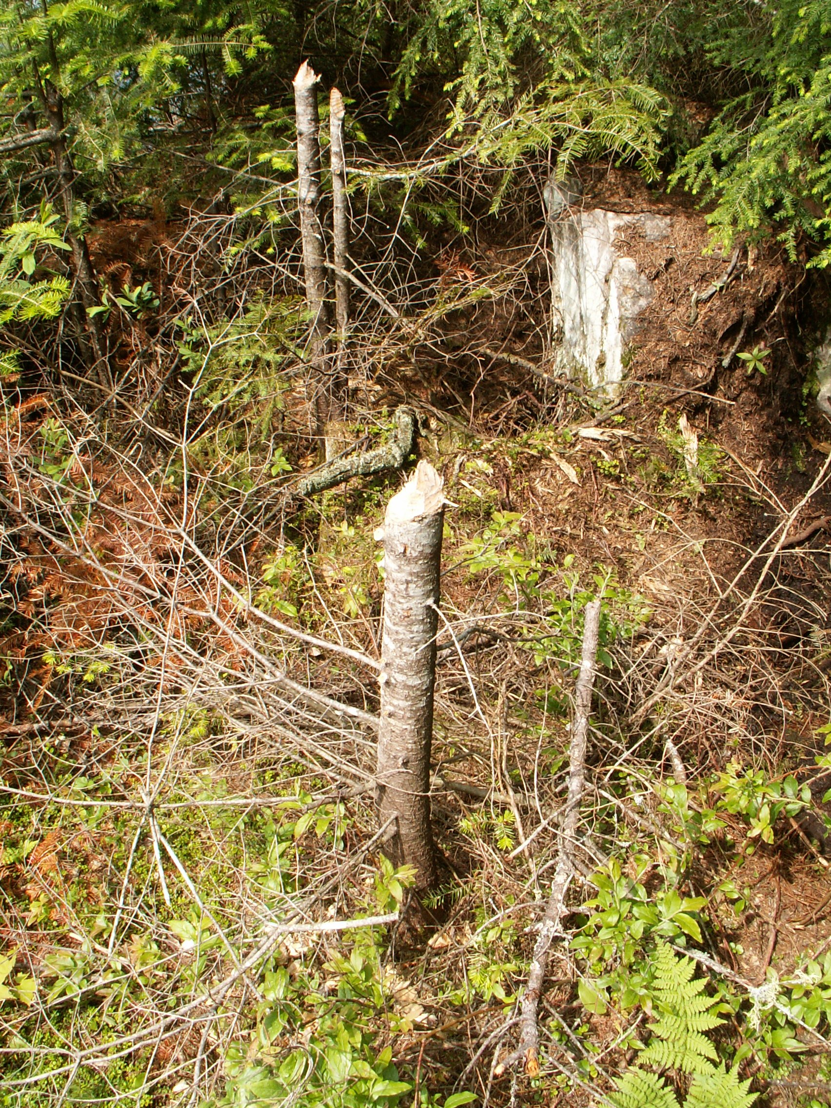 Von Bibern gefällte Bäume im Algonquin Provinvial Park Ontario Kanada.